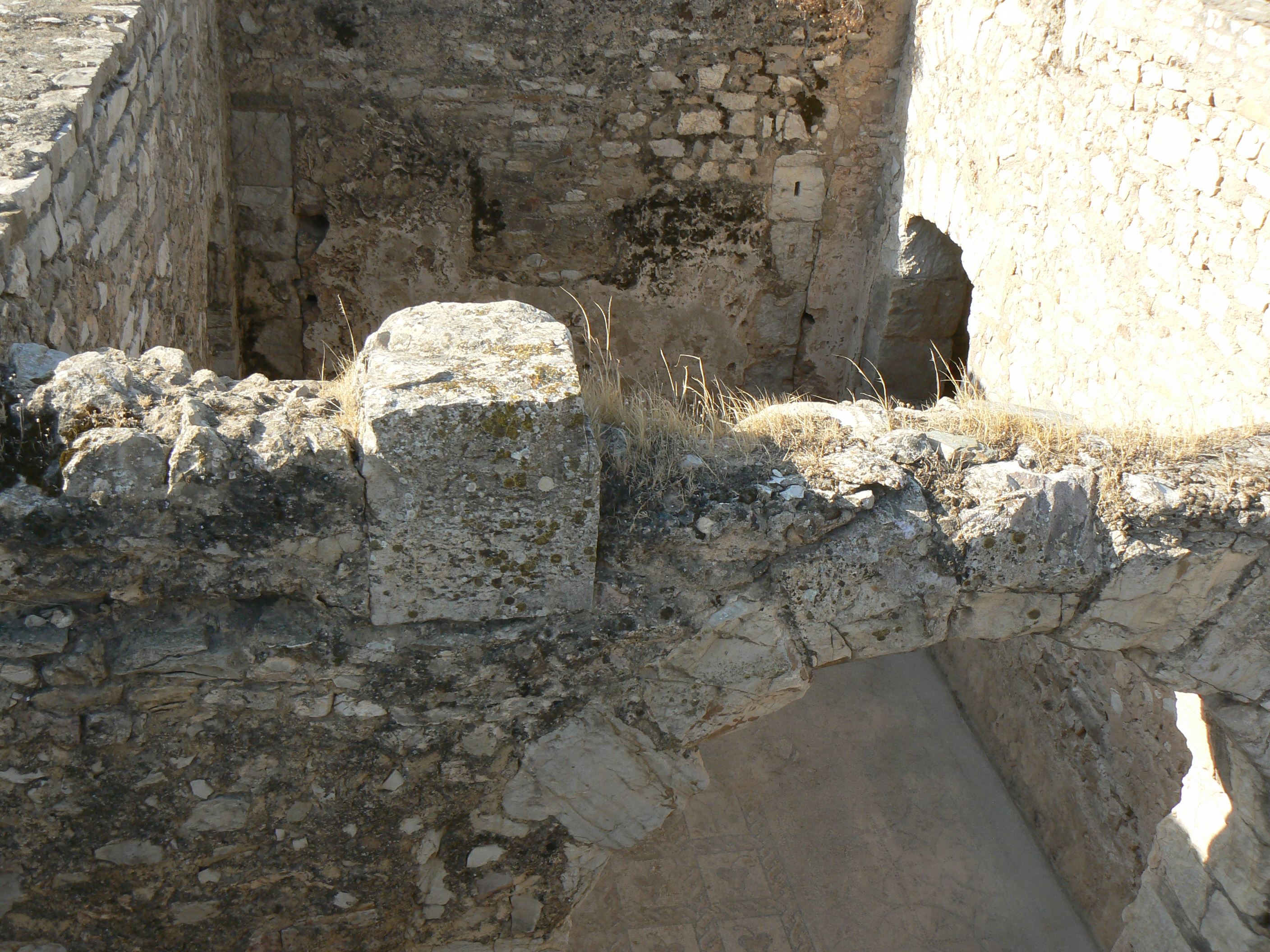 maison du trésor à Bulla Regia, Tunisie